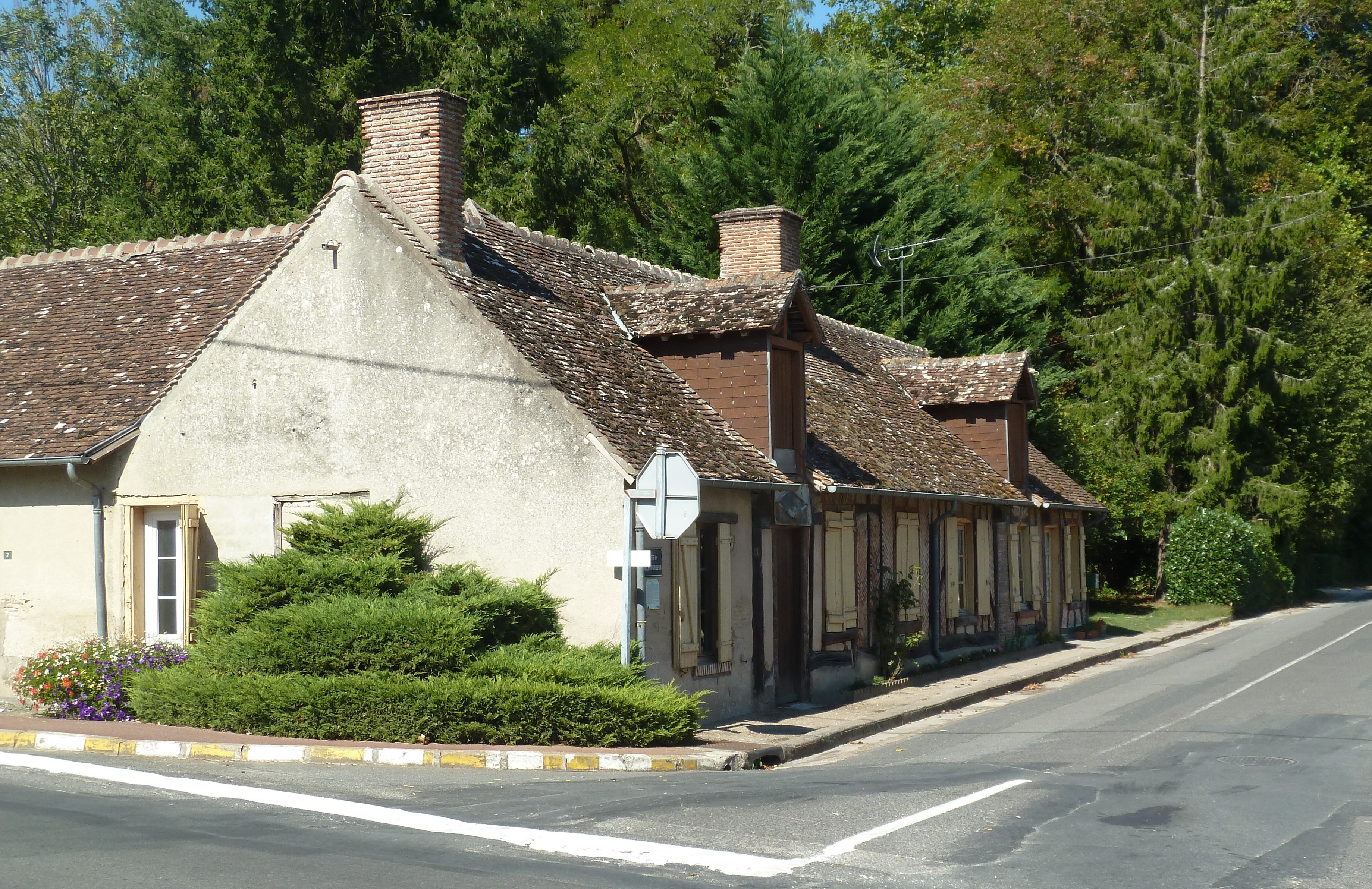 Maison à pans de bois "St Léon" à Neung-sur-Beuvron, Loir-et-Cher, France